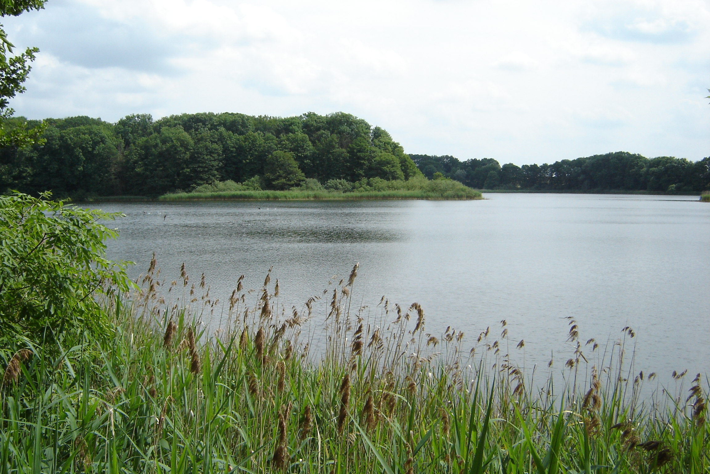 Der Bolzer See im gleichnamigen Naturschutzgebiet (Landkreis Parchim, Mecklenburg-Vorpommern).